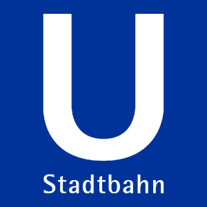 Stadtbahn-Logo der Stuttgarter Straßenbahnen